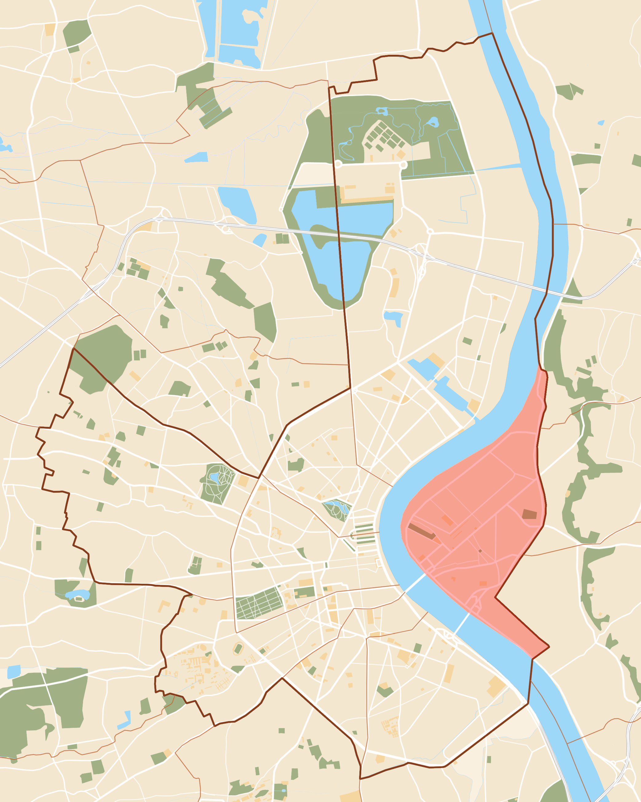 Plan de Bordeaux avec le Canton 7.